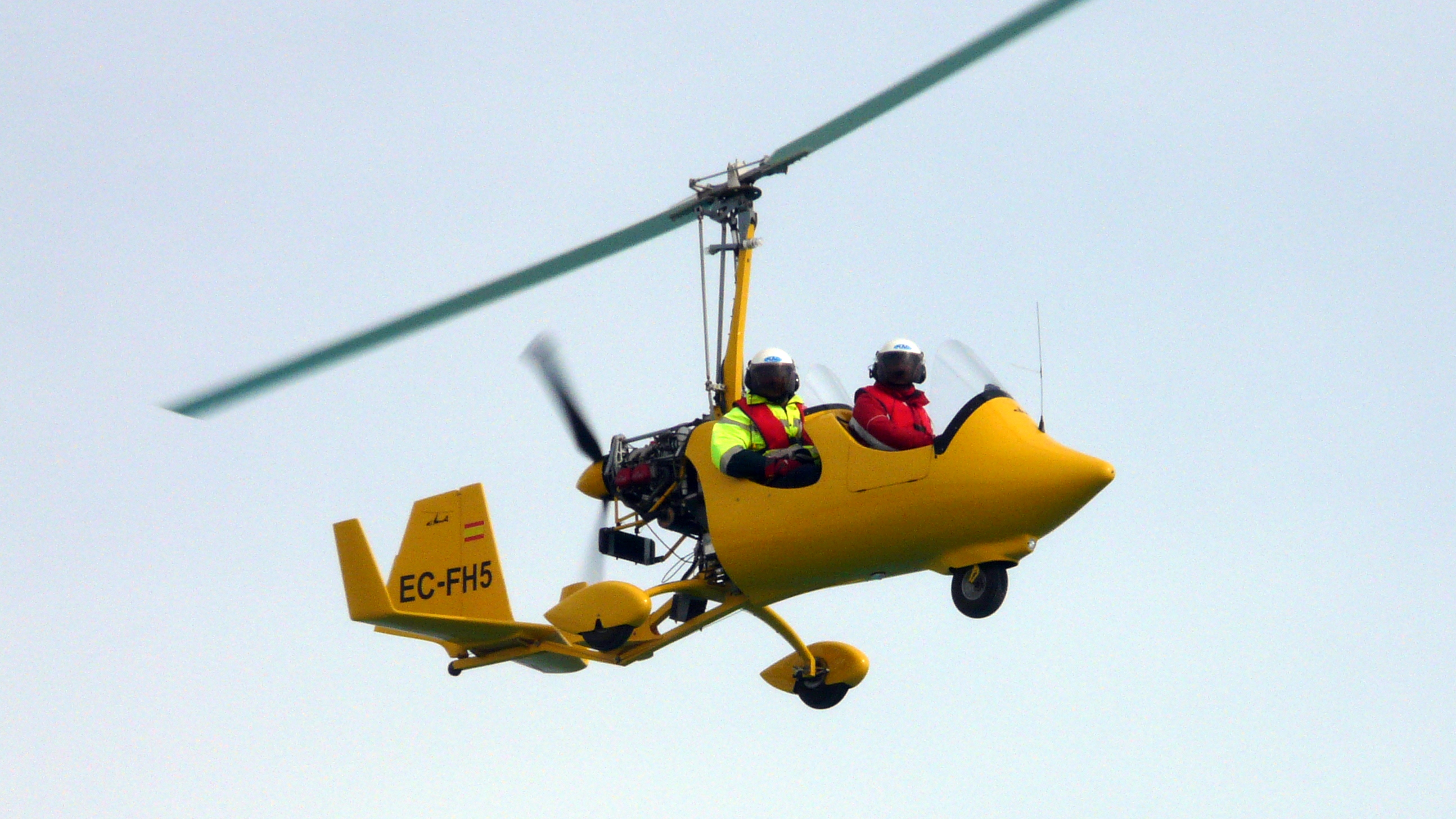 Autogyro EC-FH5